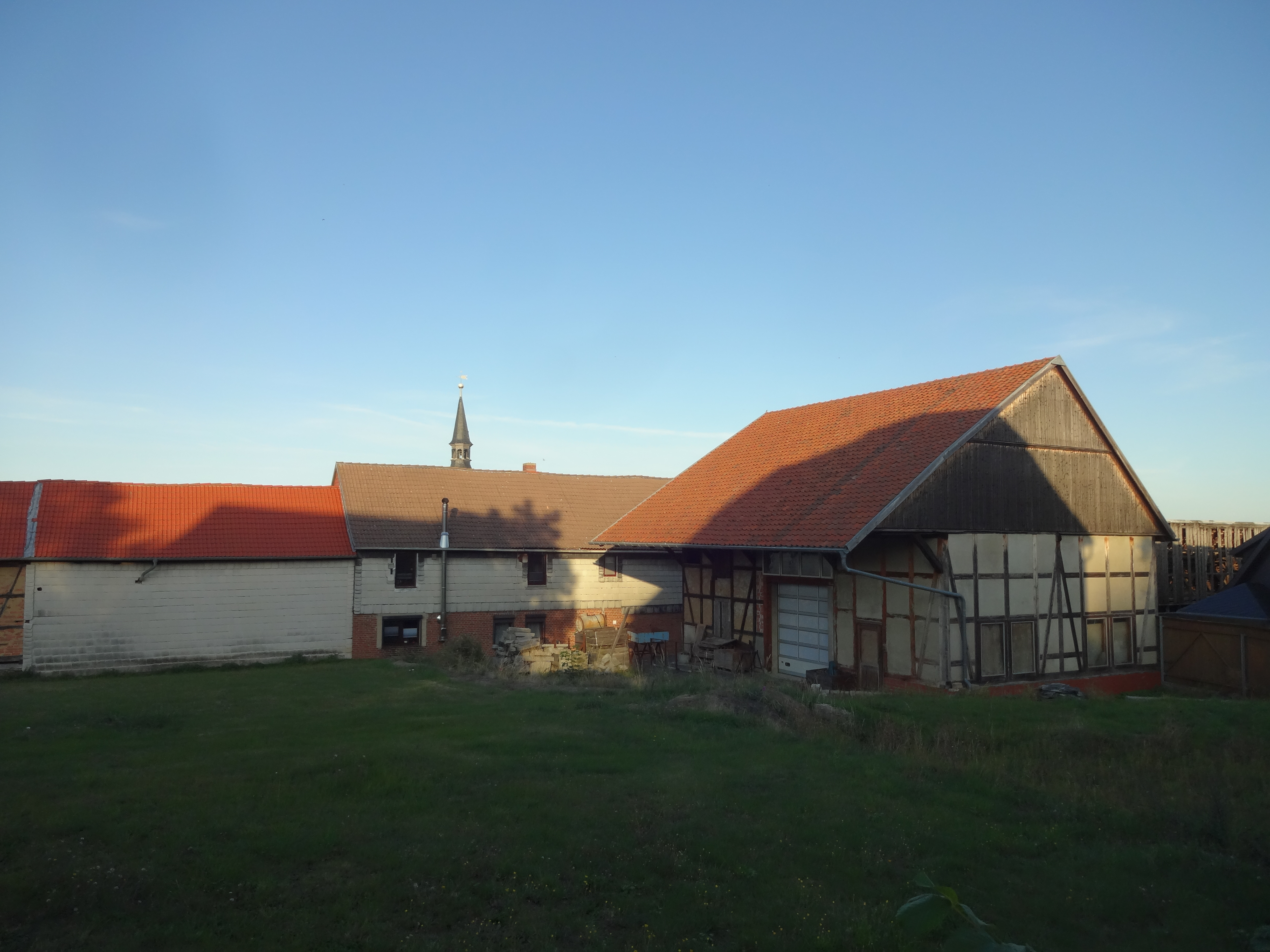 ehemals denkmalgeschütztes Wohnhaus in der Straße Oberdorf 16 in Heimburg